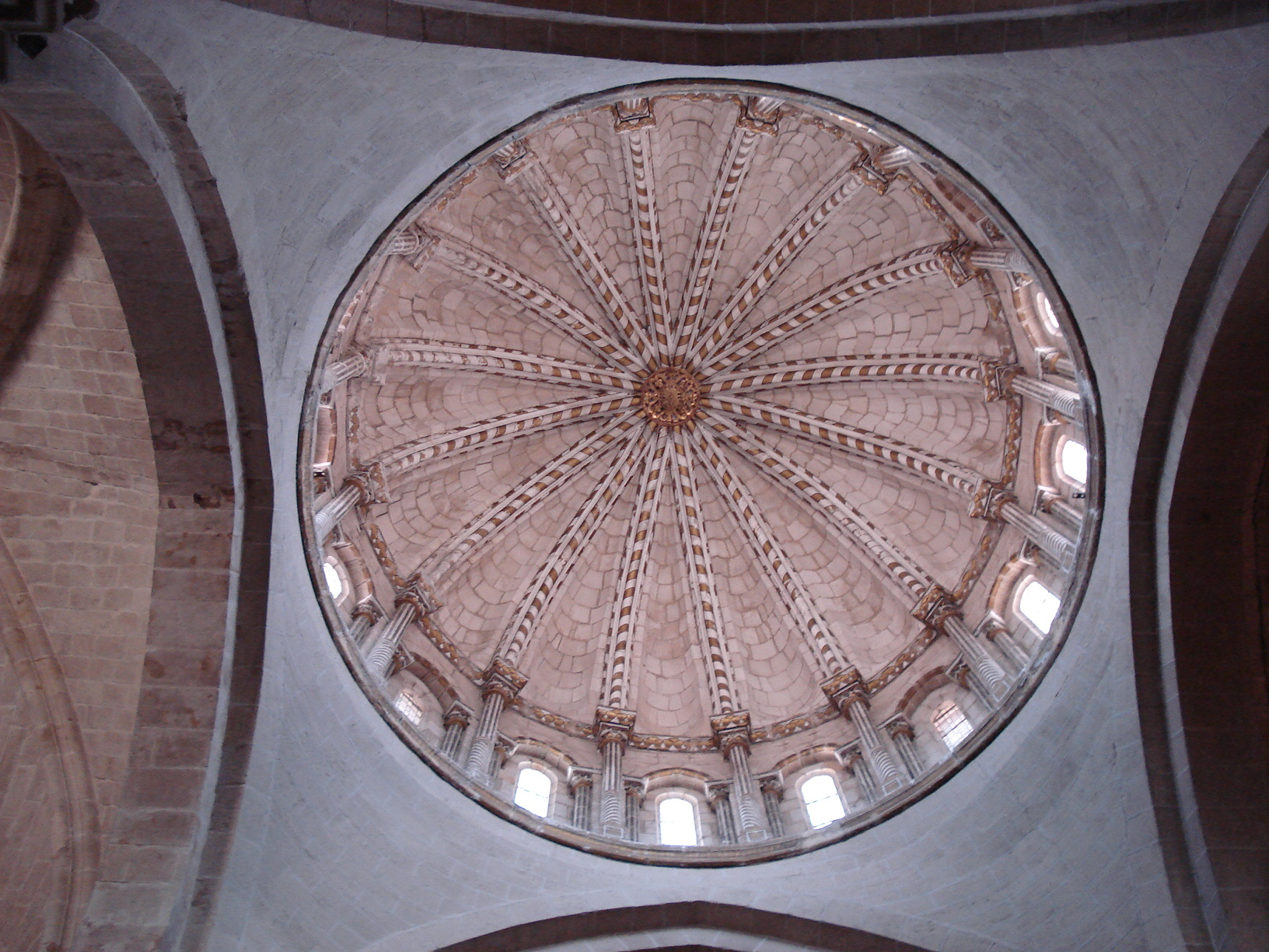 Catedral de Zamora - Interior del cimborrio